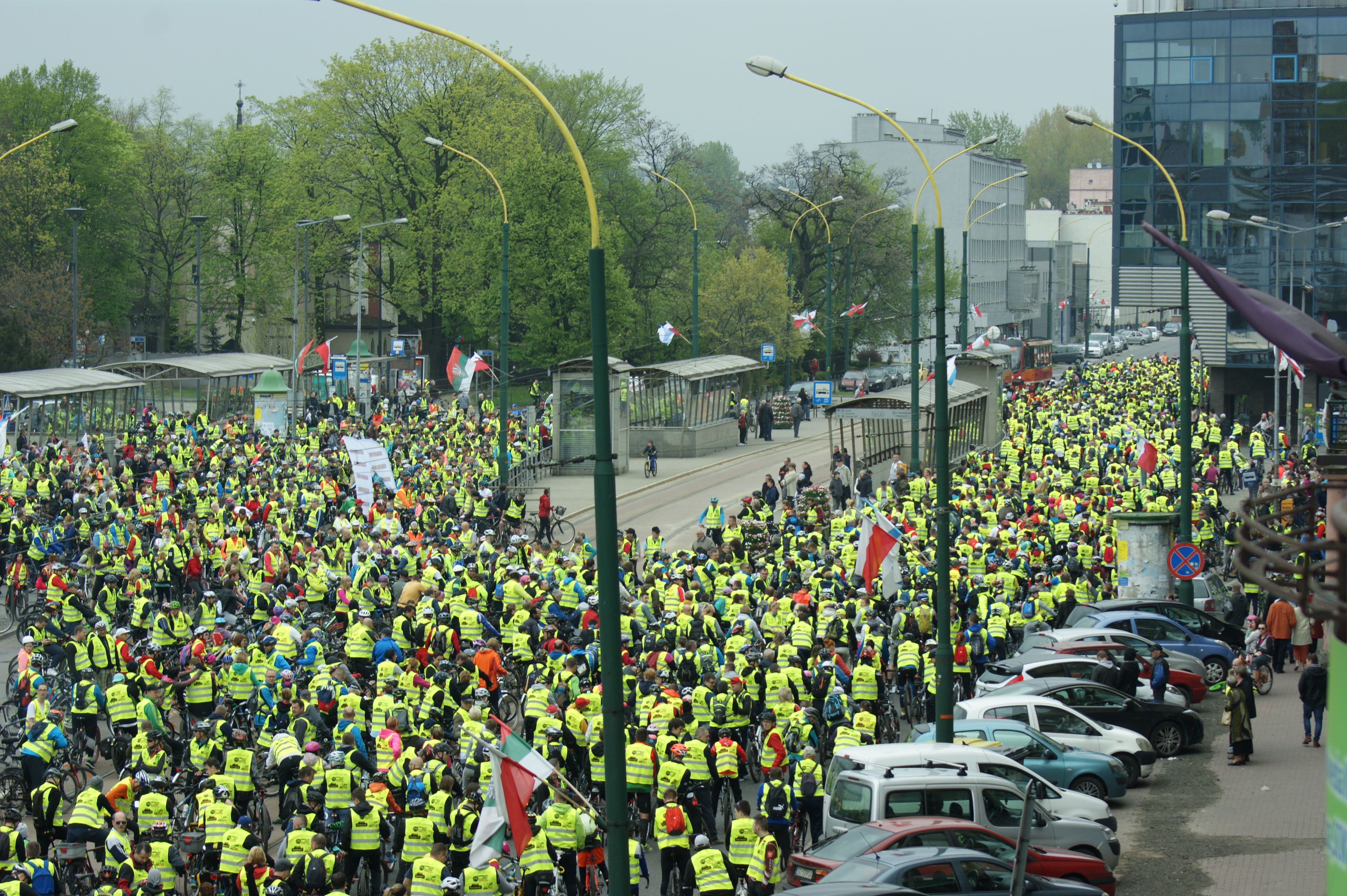 Zagłębiowska Masa Krytyczna podczas startu w Sosnowcu (3.04.2017r.)